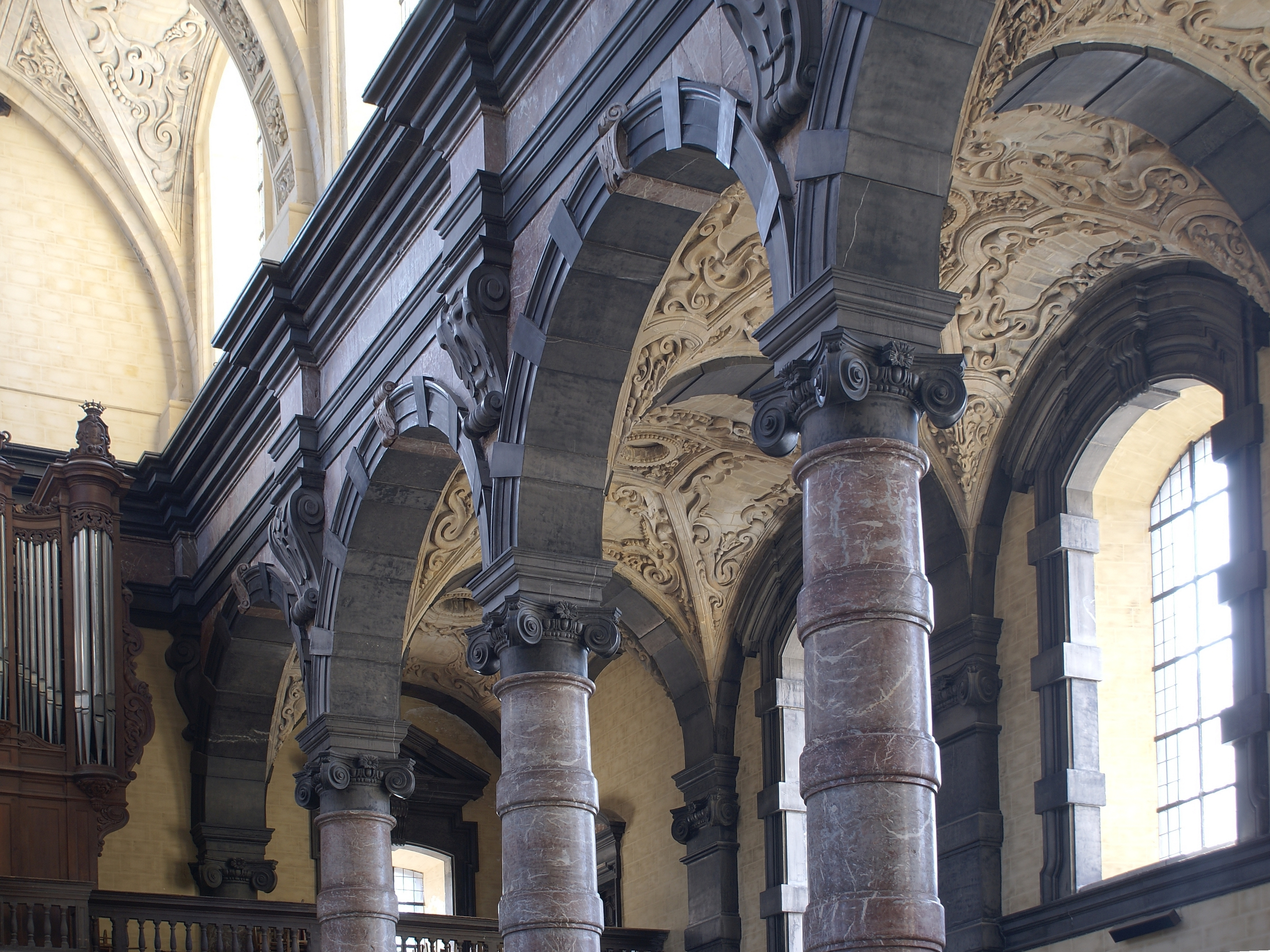 Eglise Saint-Loup (Namur), colonnes en marbre rouge et noir; Saint-Loupkerk (Namen), zuilen in rood en zwart marmer